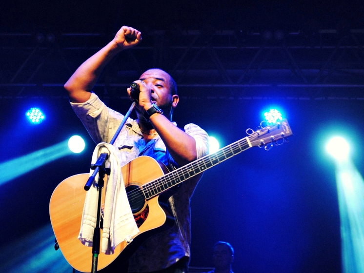 Luiz Arcanjo, vocalista do Trazendo a Arca durante o Jesus Vida Verão 2012. Imagem fotografada por Marcus Melo.